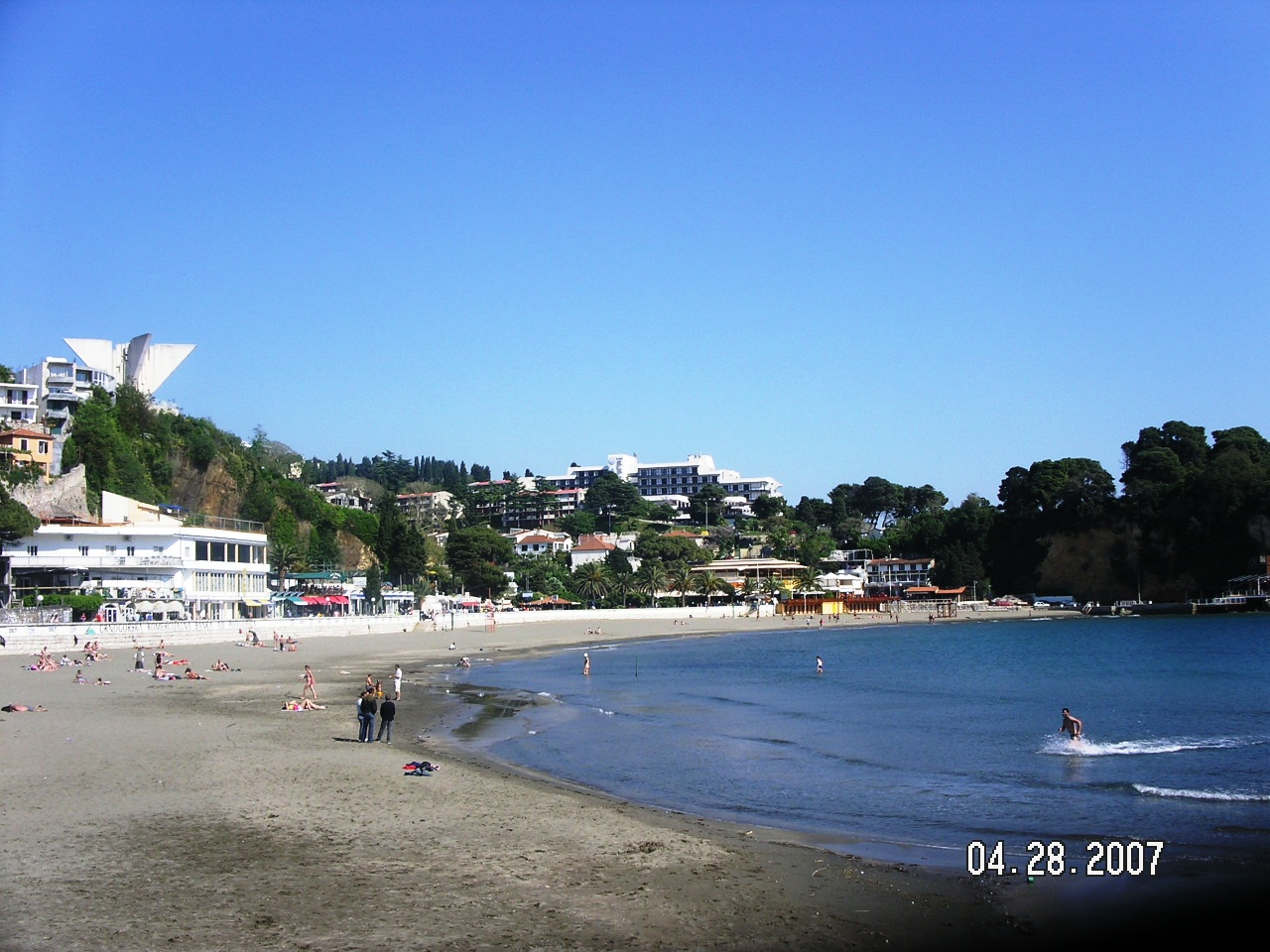 Plazha e Ulqinit